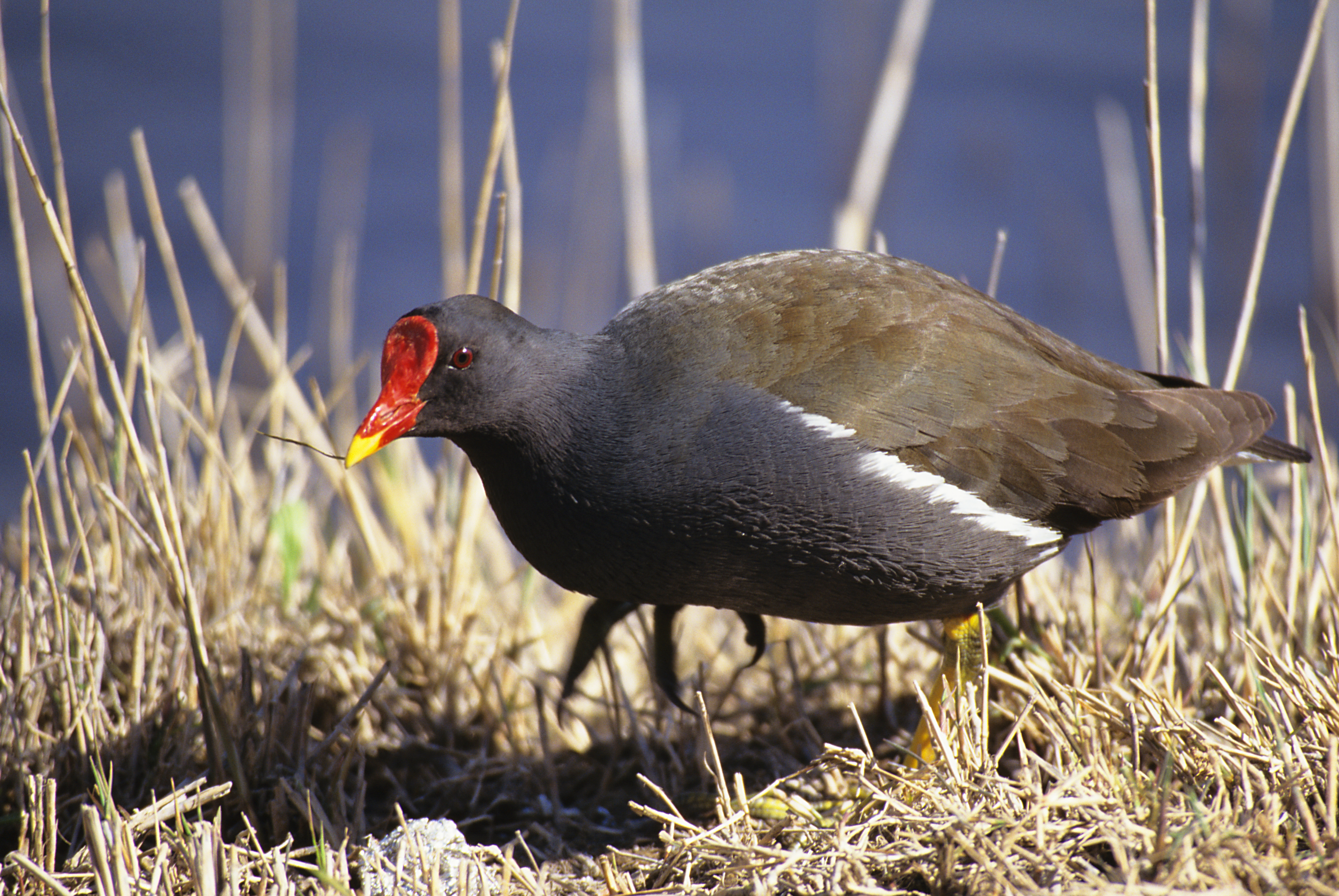 Polla de agua